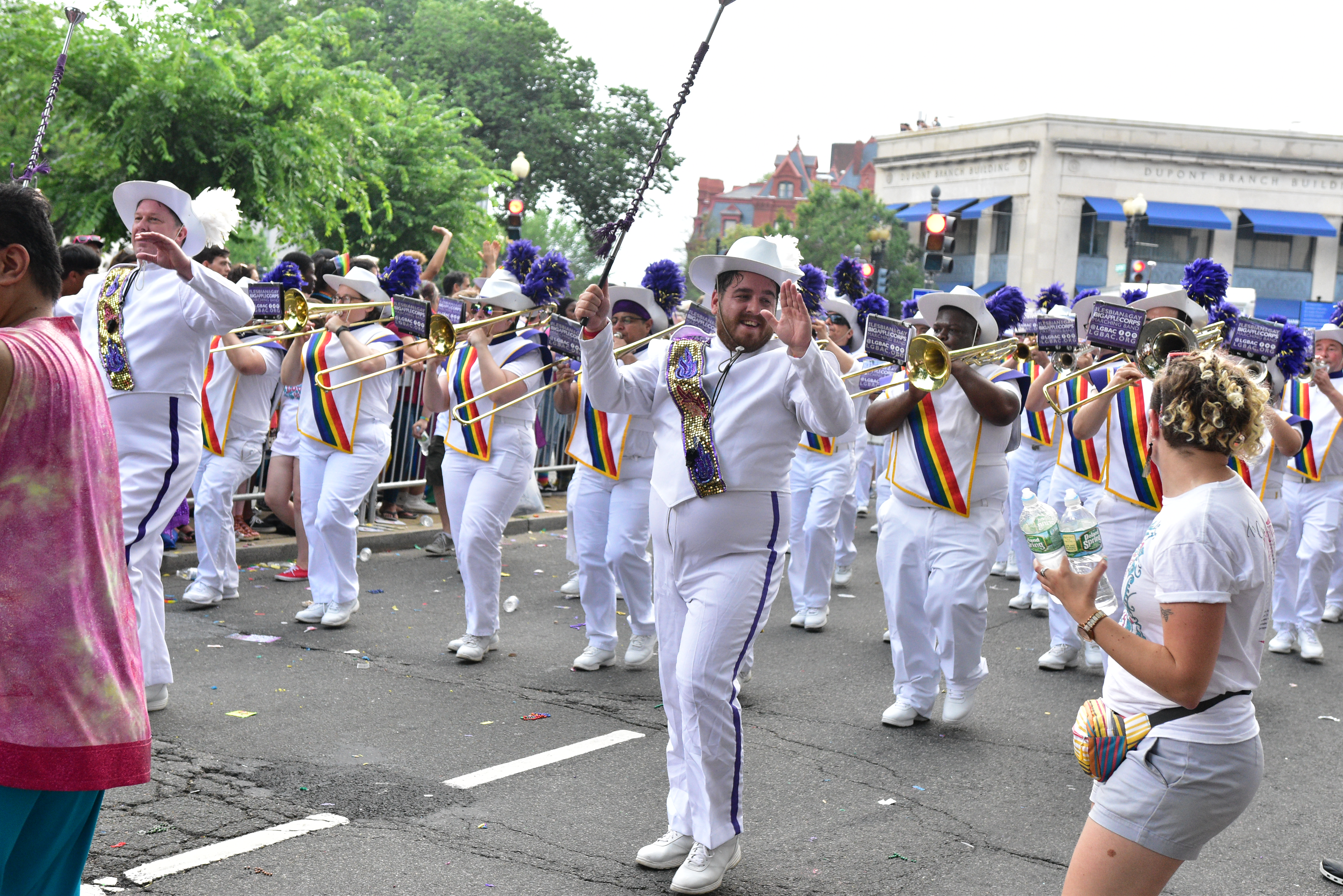 Capital Pride Parade 2018